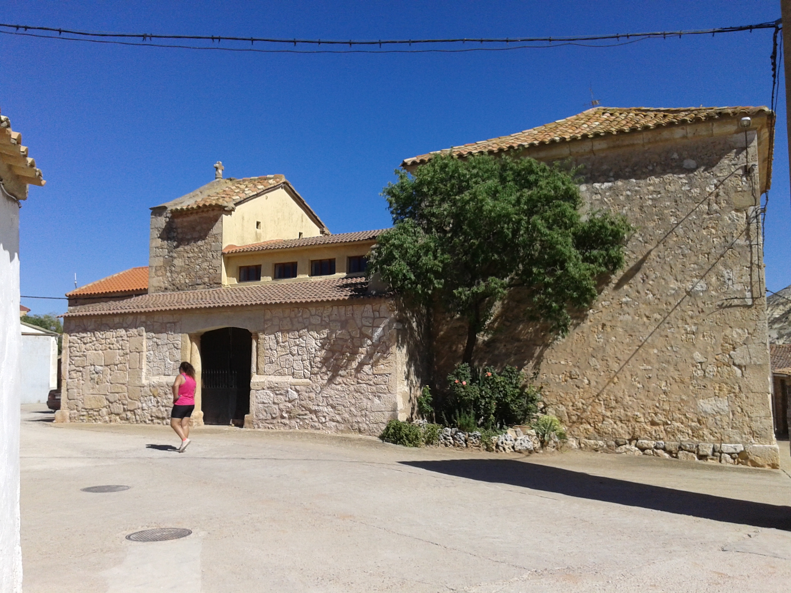 Calle de Jodra de Cardos.